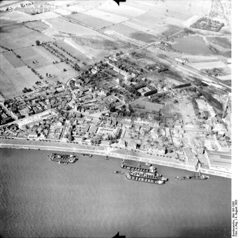 Rheinbefliegung der Alliierten 1953